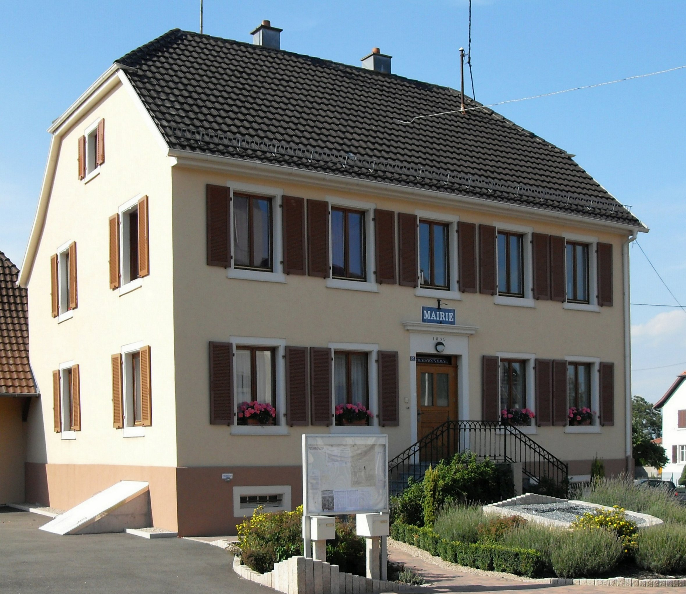 La mairie de Mœrnach